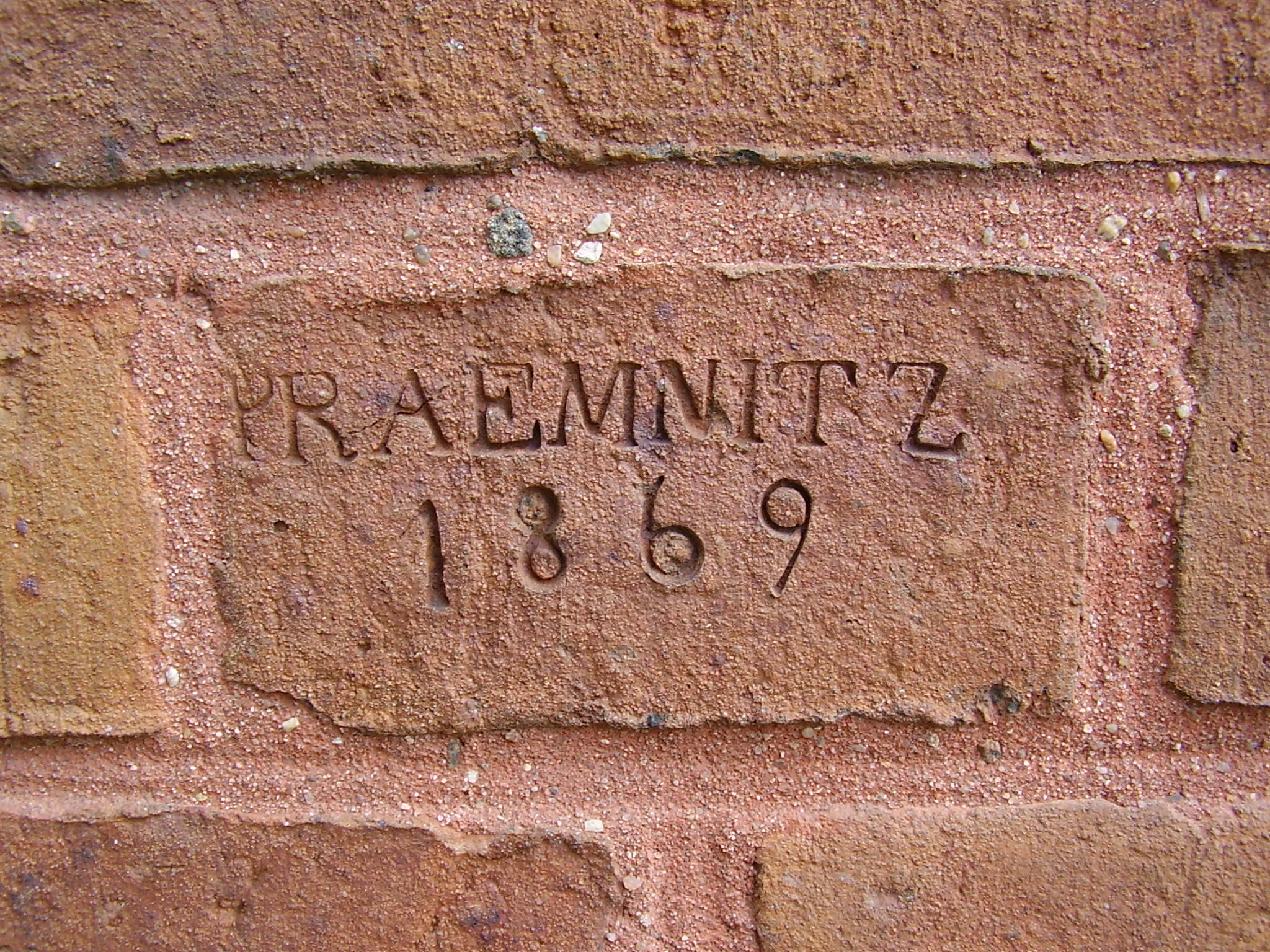 Stempel cegielniany - Promnice, znajdujący się na murze byłego szpitala psychiatrycznego w Owińskach.